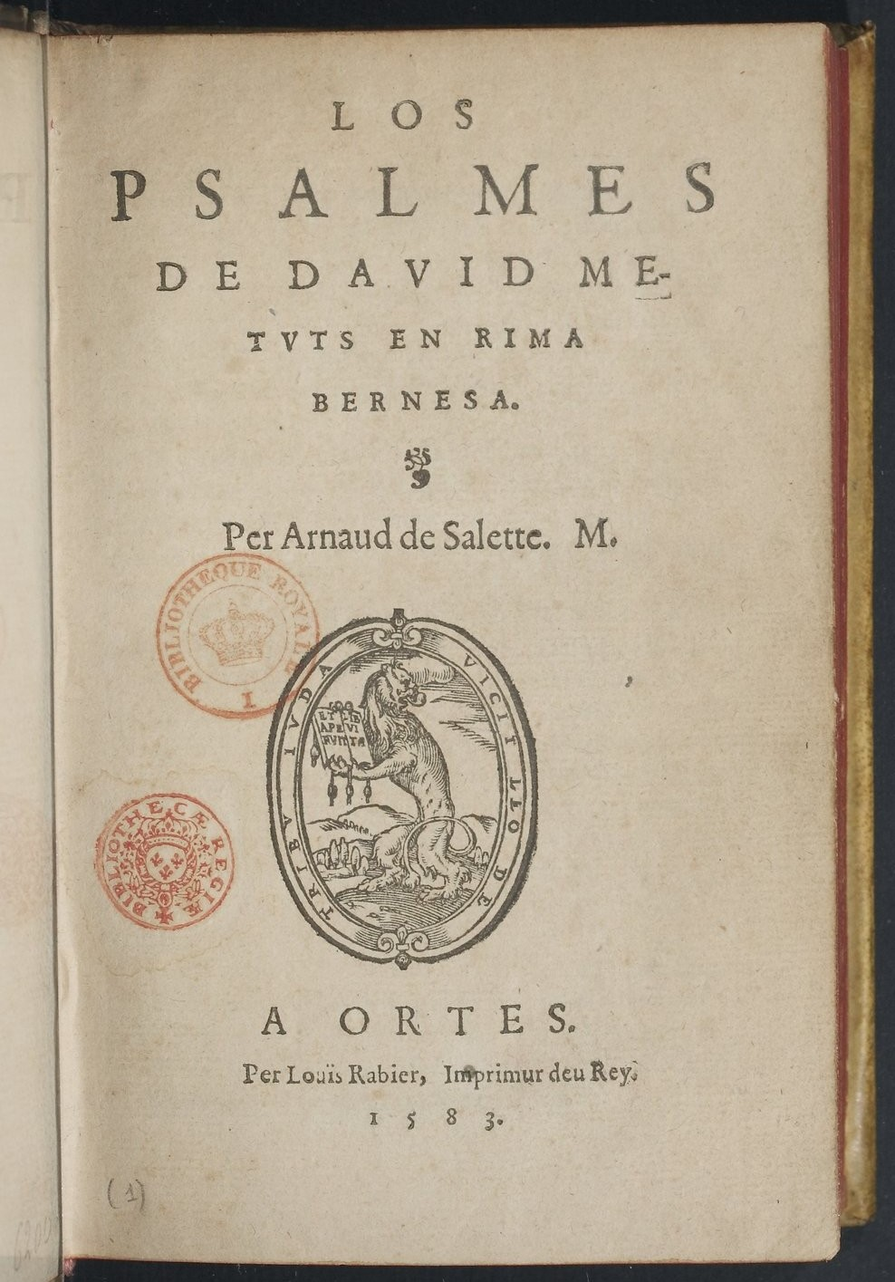 Los Psalmes de David metuts en rima bernesa. Arnaud de Salette.